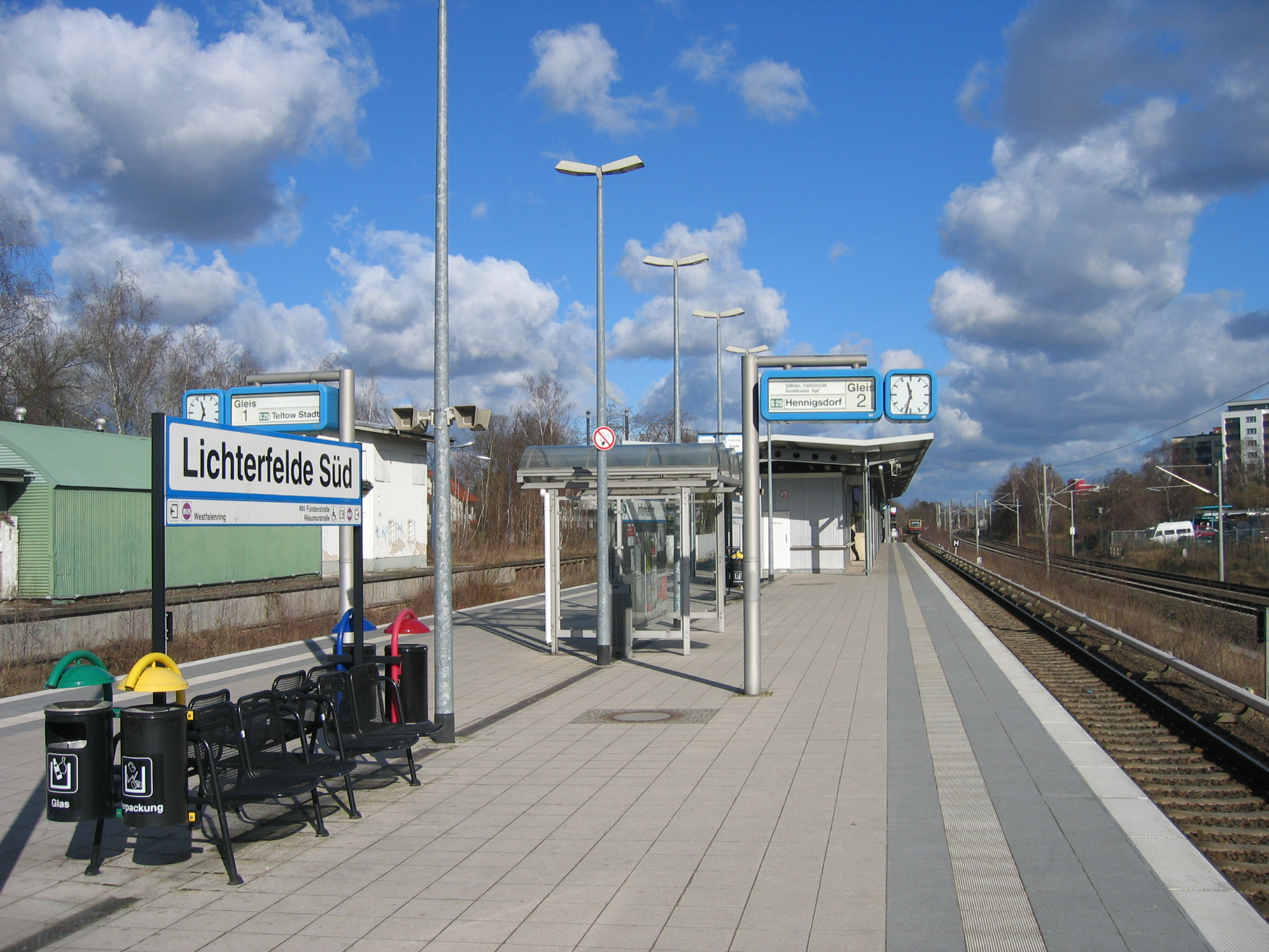 S-Bahnhof Berlin-Lichterfelde Süd